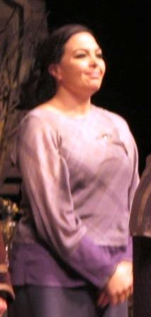 Sevil Akı Dört Kişilik Bahçe oyunu sonrasında seyirciyi selamlarken, 29 Ekim 2010, Harbiye Muhsin Ertuğrul Sahnesi